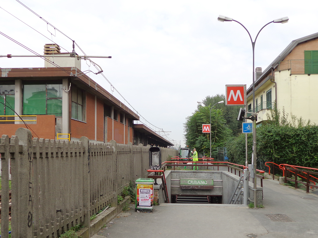 Stazione di Cimiano della metropolitana di Milano, ingresso sul lato sud di via Palmanova.